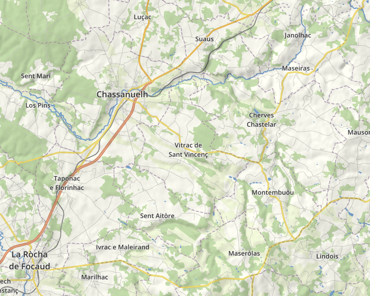 Mapa occitana de las comunas. Font: OpenStreetMap.